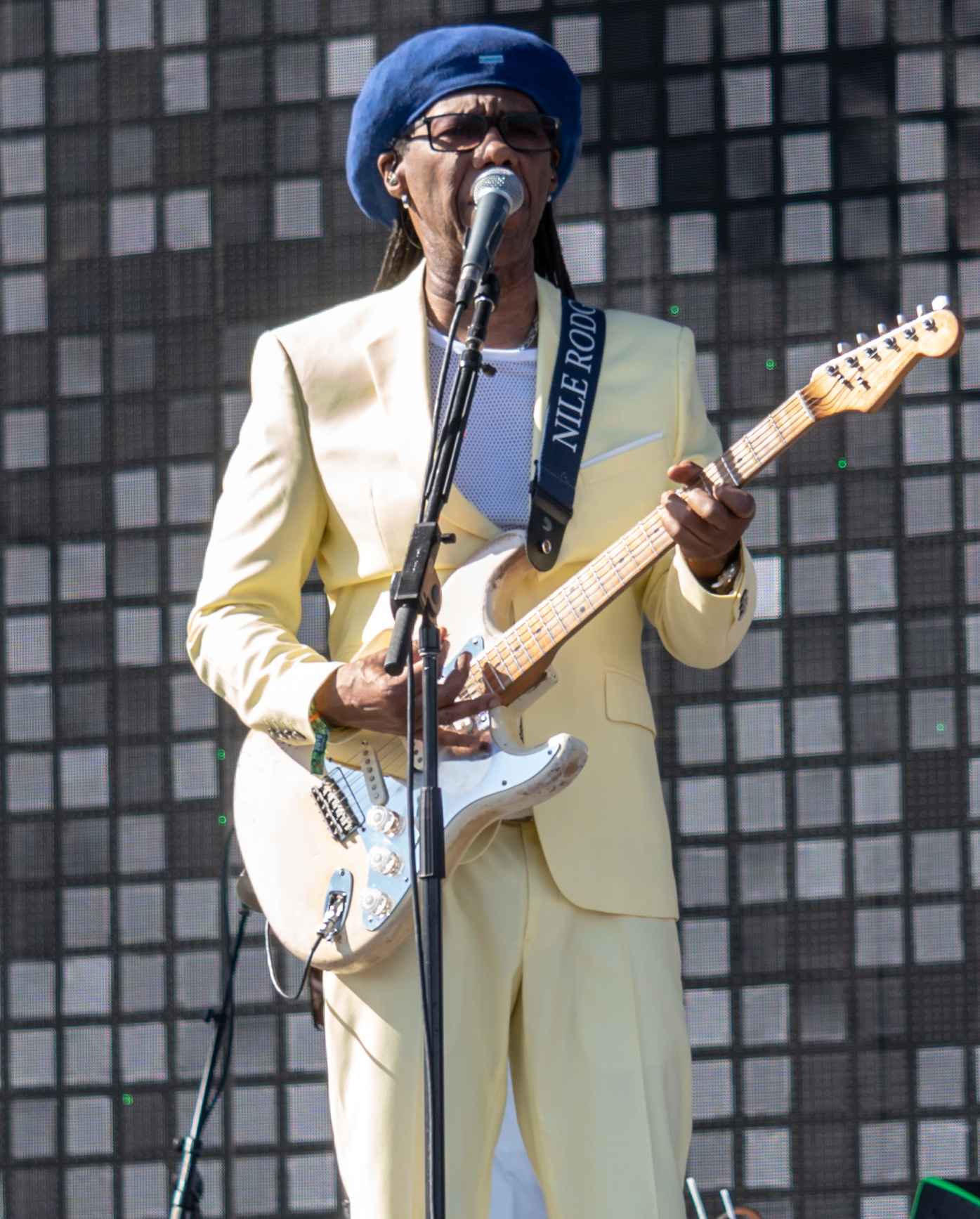 Coachella18W1-174